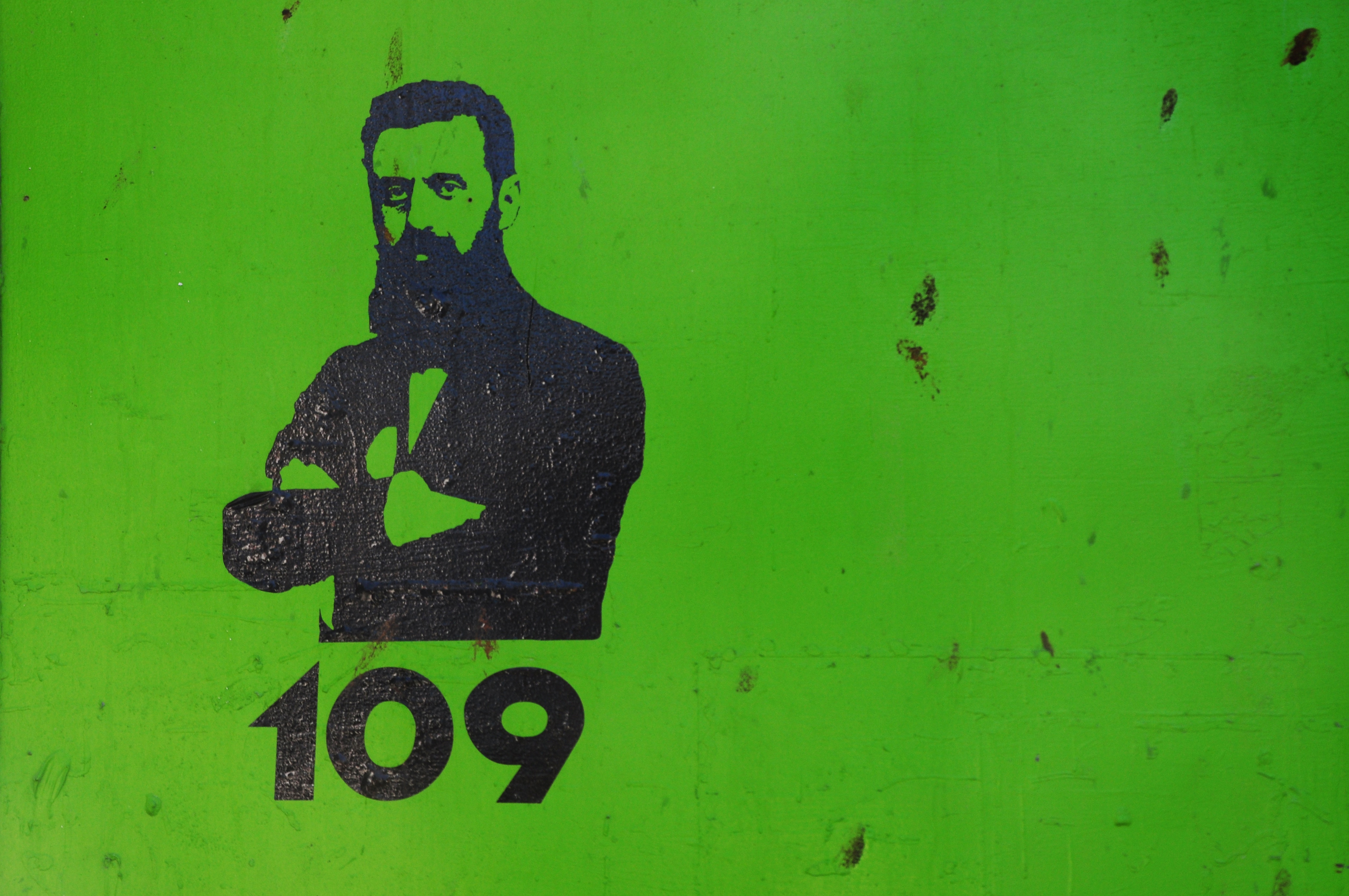 16249 Tel Aviv-Yafo